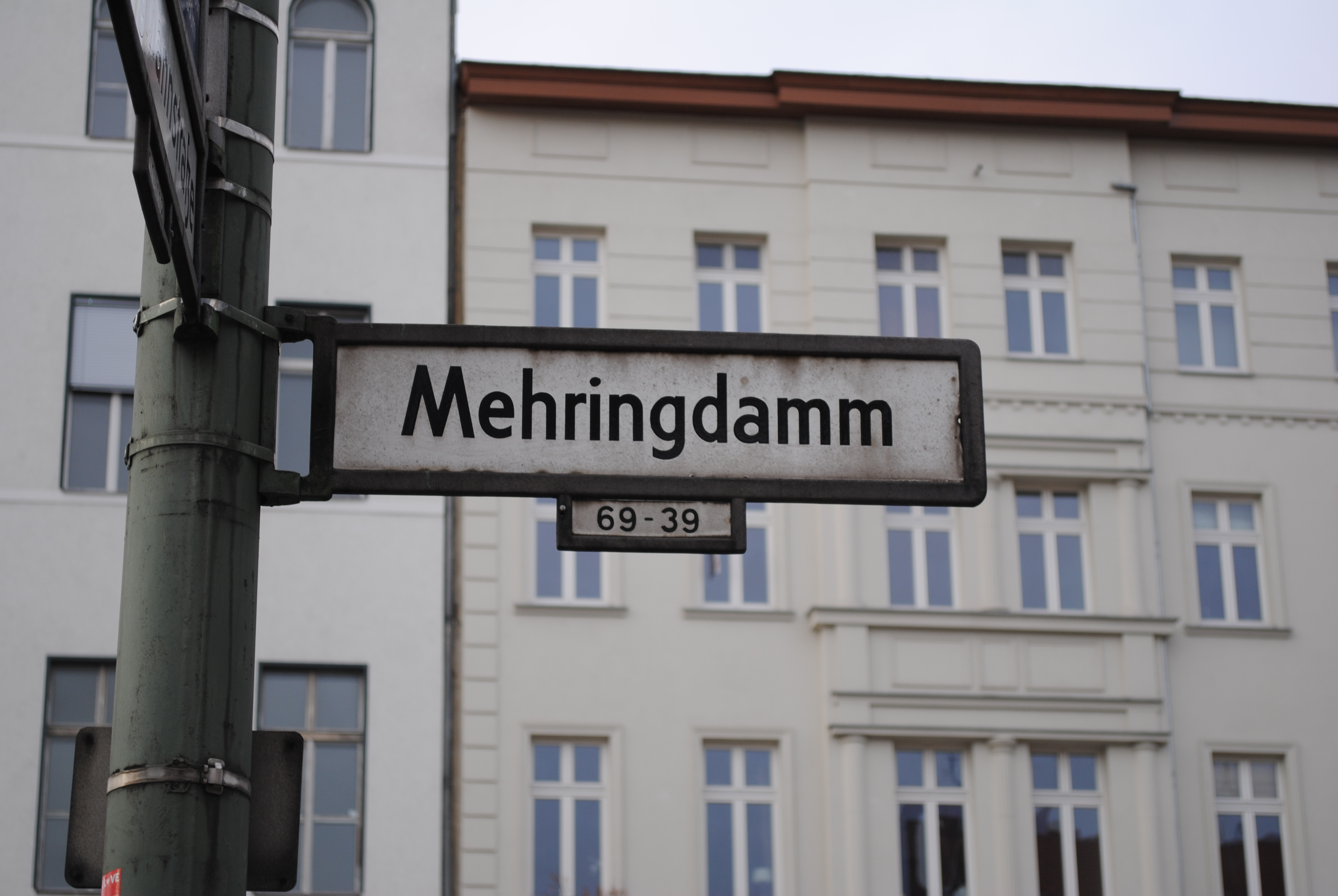 Mehringdamm Schild